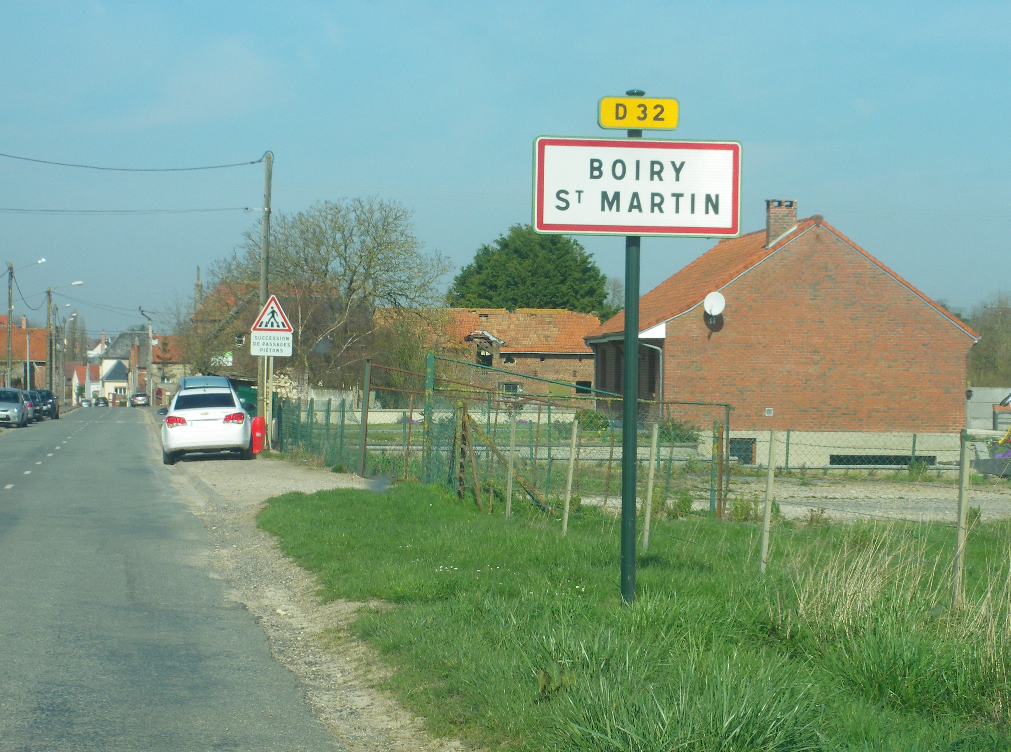 Vue d'une entrée de la commune de Boiry-Saint-Martin.